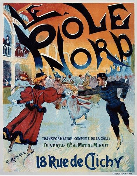 Le Pole Nord [rue de Clichy, Paris], affiche lithographiée, imprimerie Camis, Paris.